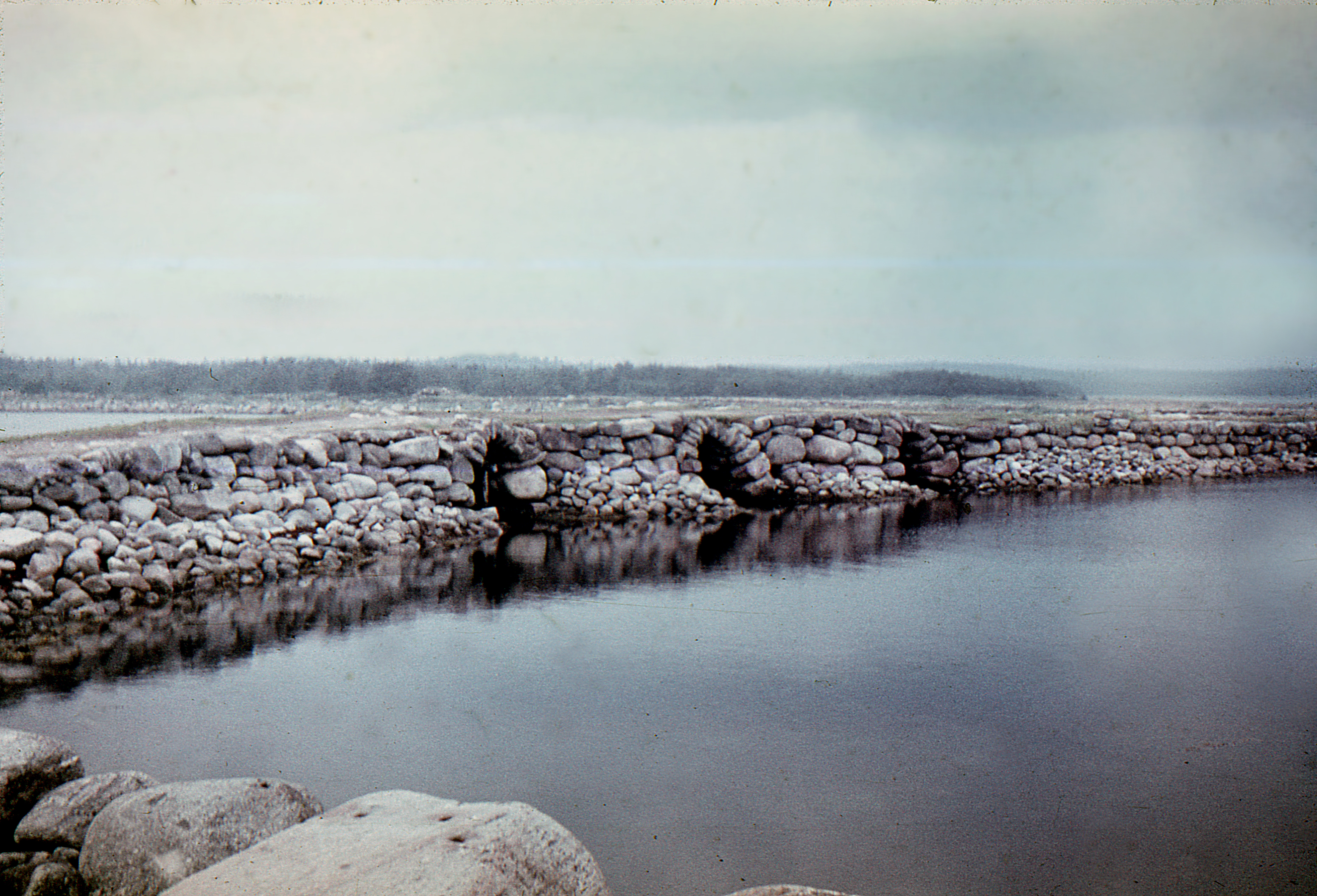 Соловецкий архипелаг.Дамба на остров Муксалма